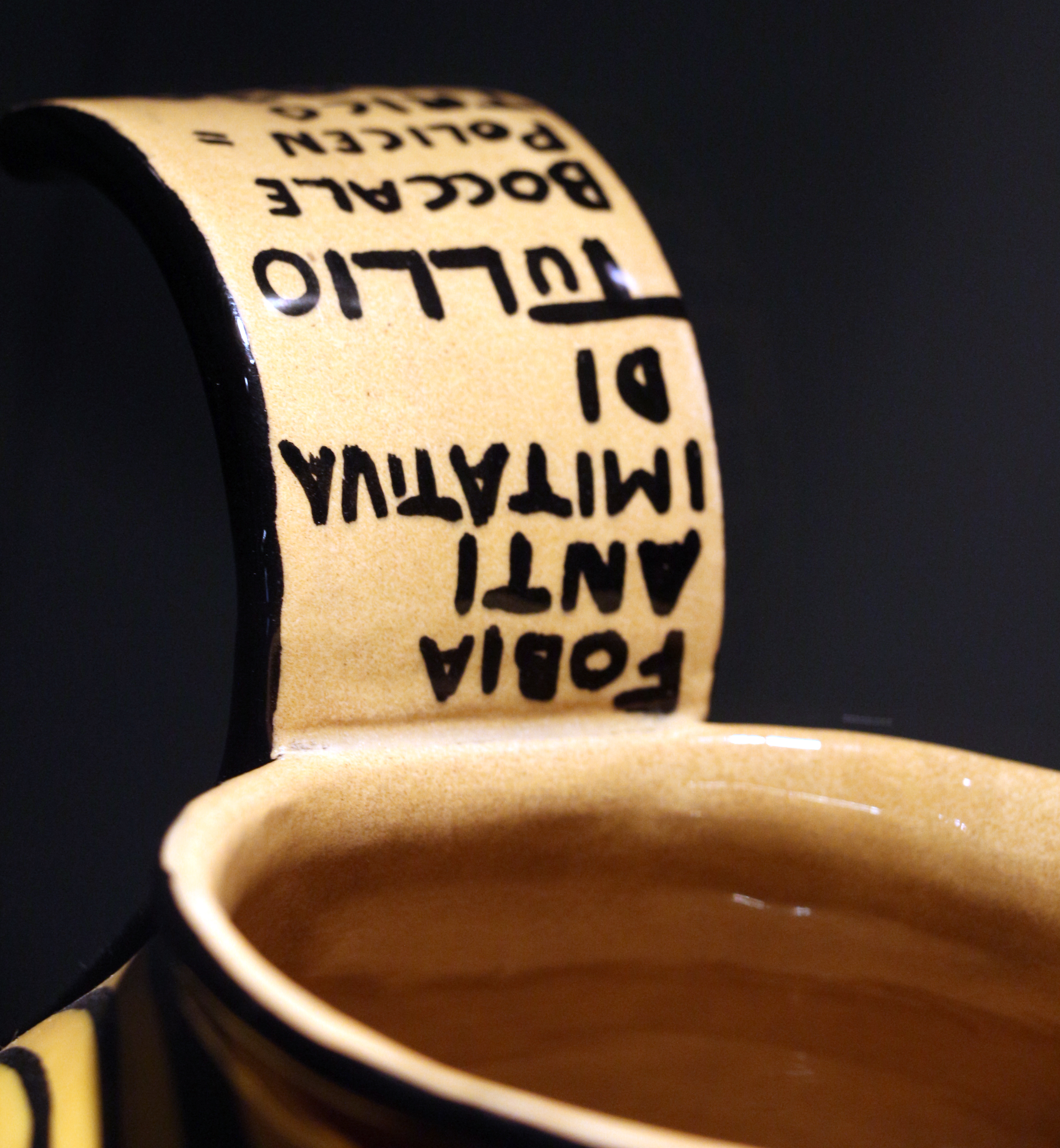 Il parco e i musei di Nervi This is a photo of a monument which is part of cultural heritage of Italy.